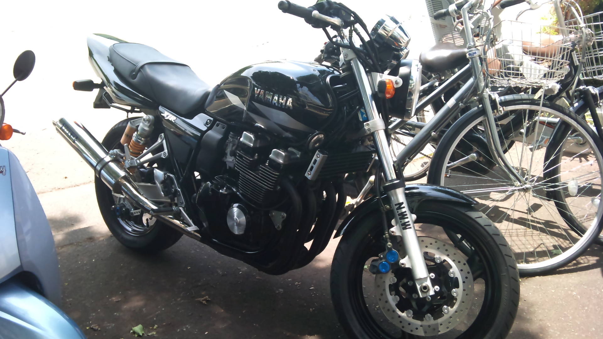 XJR400Rの写真